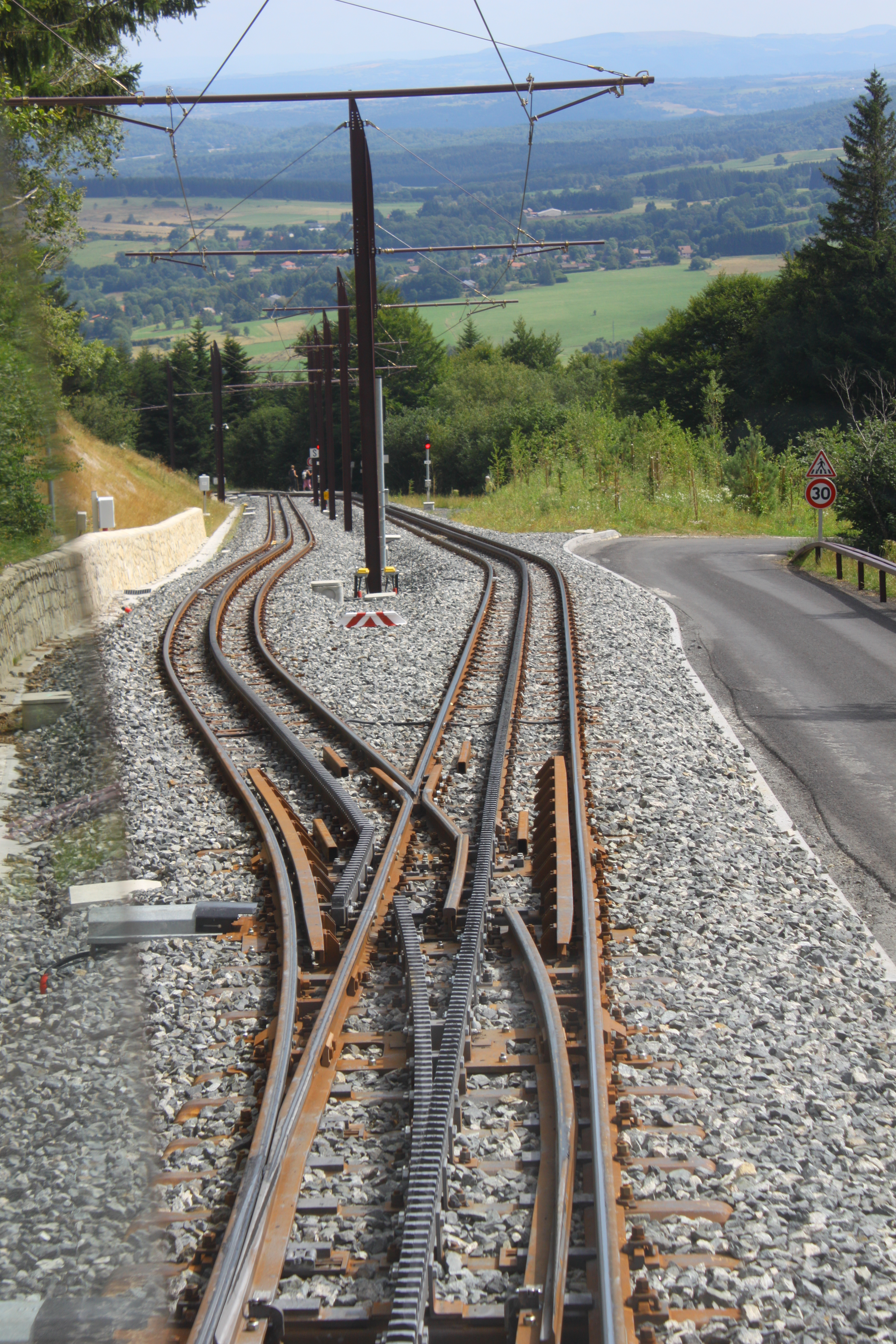 Aiguillage à mi-chemin sur la ligne du Panoramique des Dômes.